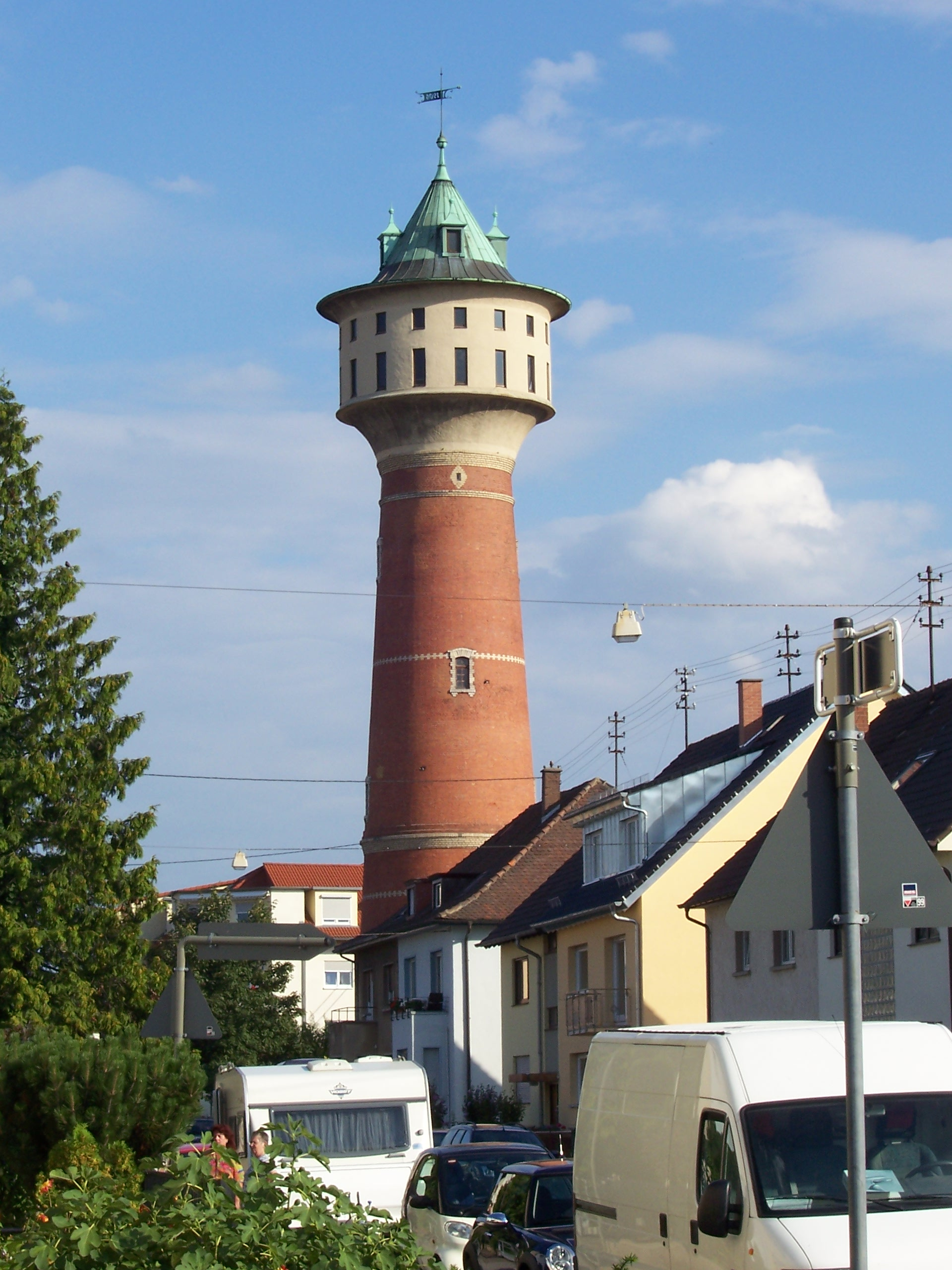 Der Wasserturm in Mannheim-Wallstadt, germany. My own photo taken 04-aug-2005